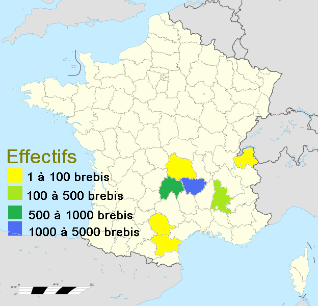 Répartition géographique des élevages de sélection de la race Bizet en nombre de brebis contrôlées par département, en 2009, d'après des résultats publiés par l'Institut de l'Elevage (France). Le département de la Haute-Loire (en bleu), berceau de la race Bizet, détient la majorité des brebis en élevages soumis au contrôle des performances